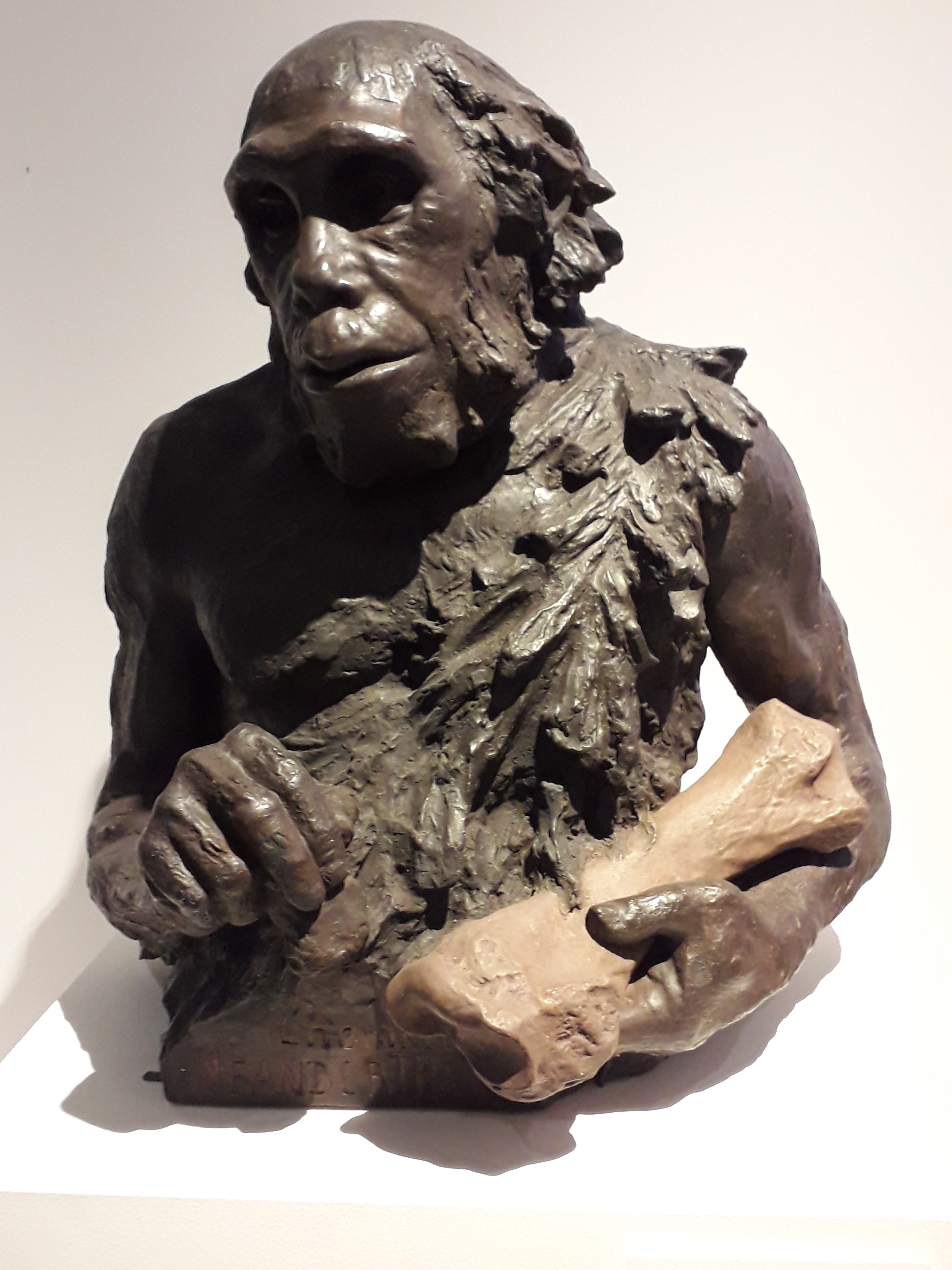 L'Homme de Néandertal. Reconstitution en plâtre peint par Louis Mascré et Aimé Rutot. 1909-1914. Institut royal des Sciences naturelles de Belgique, Bruxelles. Photographié à l'exposition "Néandertal, l'expo" au musée de l'Homme à Paris en avril 2018.